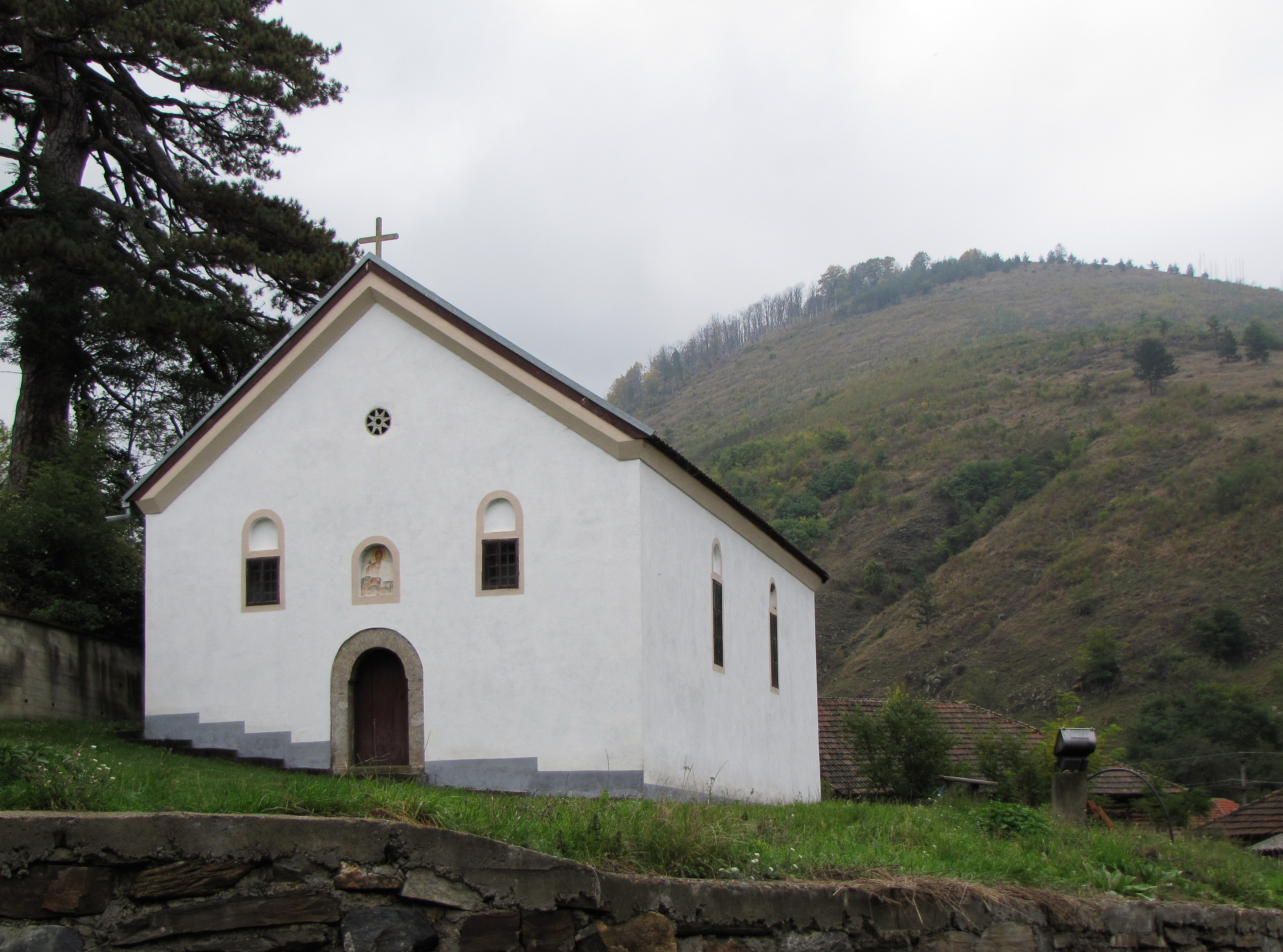 Село Доња Љубата (Босилеград).